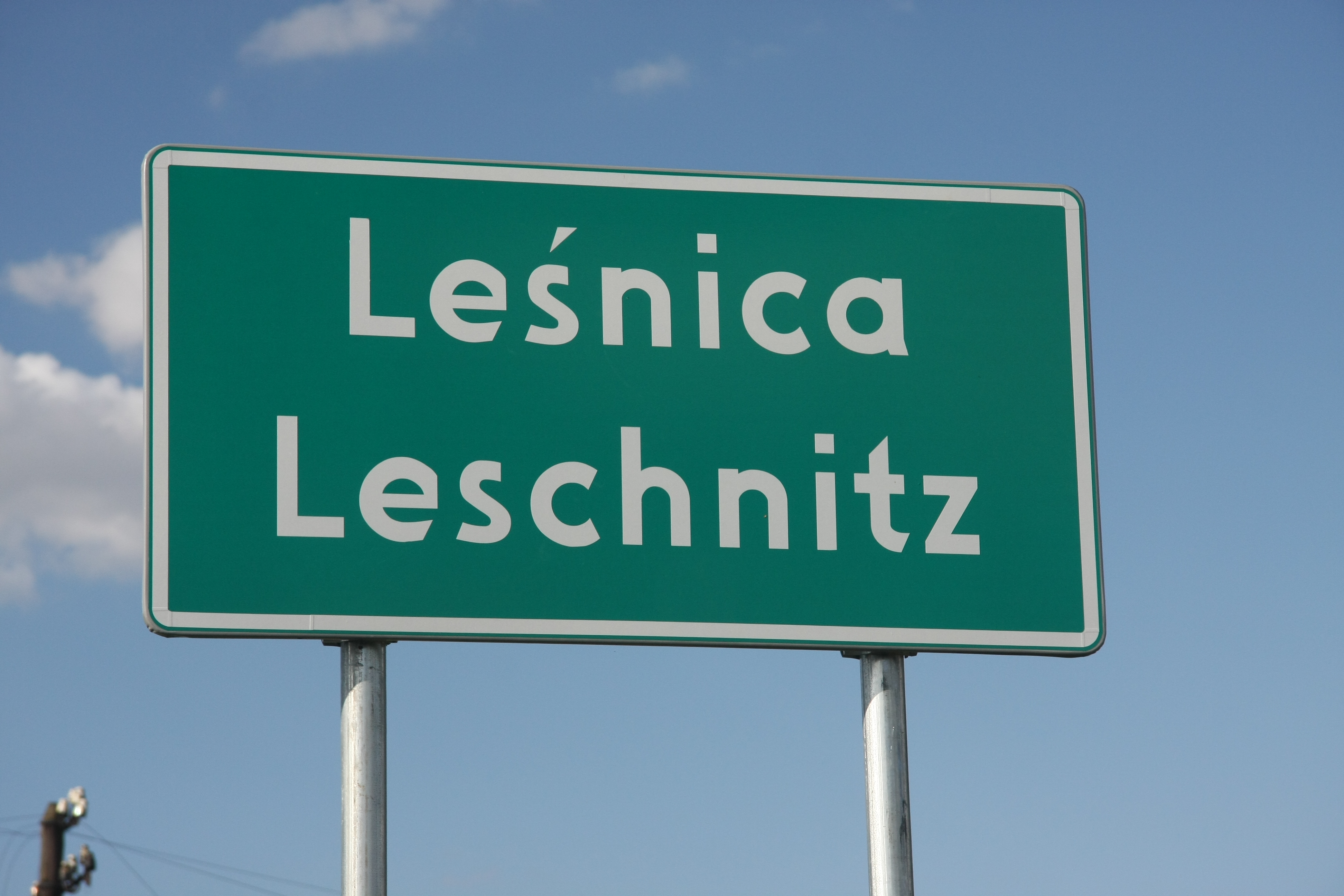 Dwujęzyczna tablica z nazwą przed wjazdem do Leśnicy